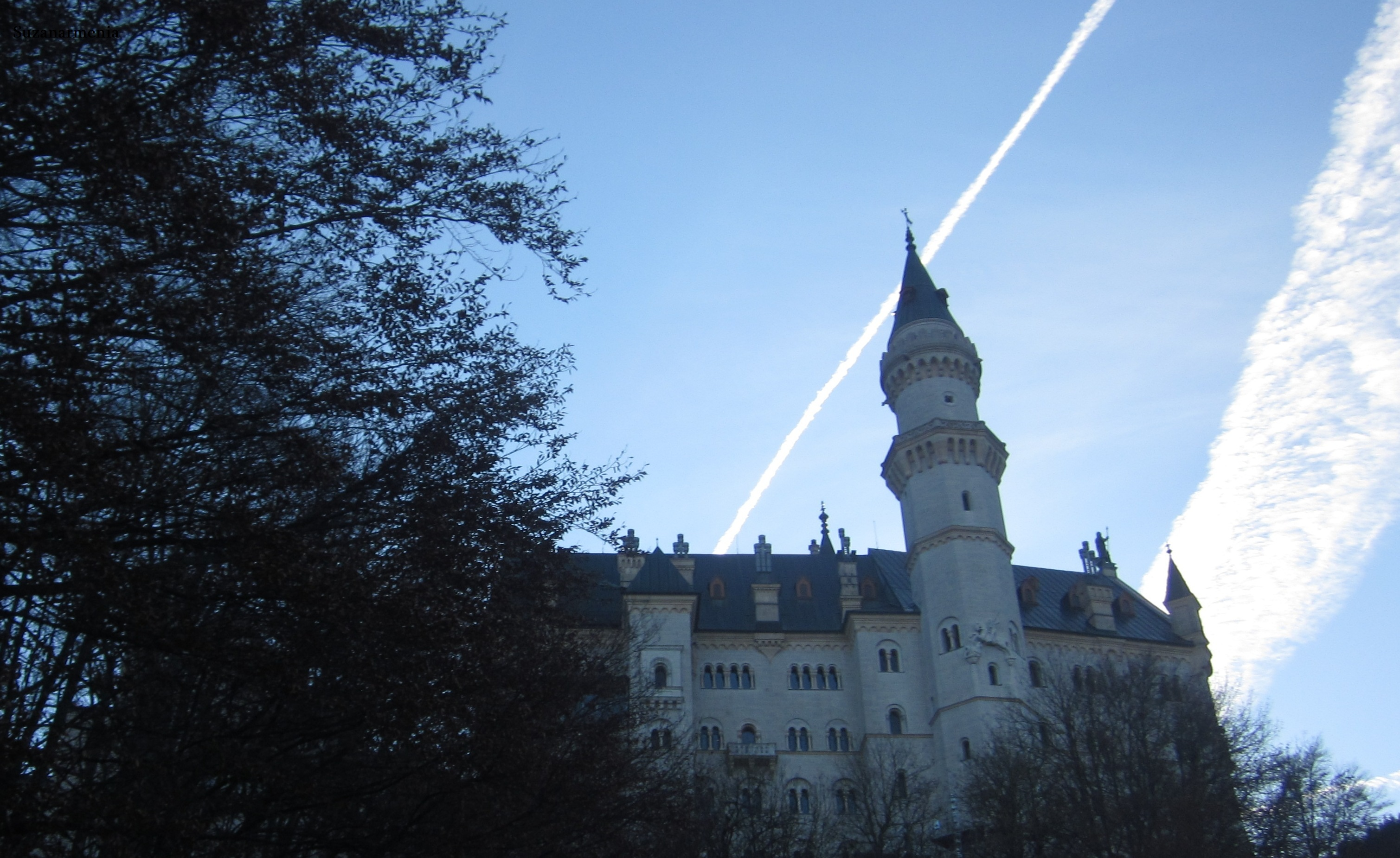 Ամենագեղեցիկ ամրոցներից մեկը: Դիսնեյի մուլտֆիլմերի ամրոցների հատակագծերն ընդօրինակված են այս ամրոցի տեսքից